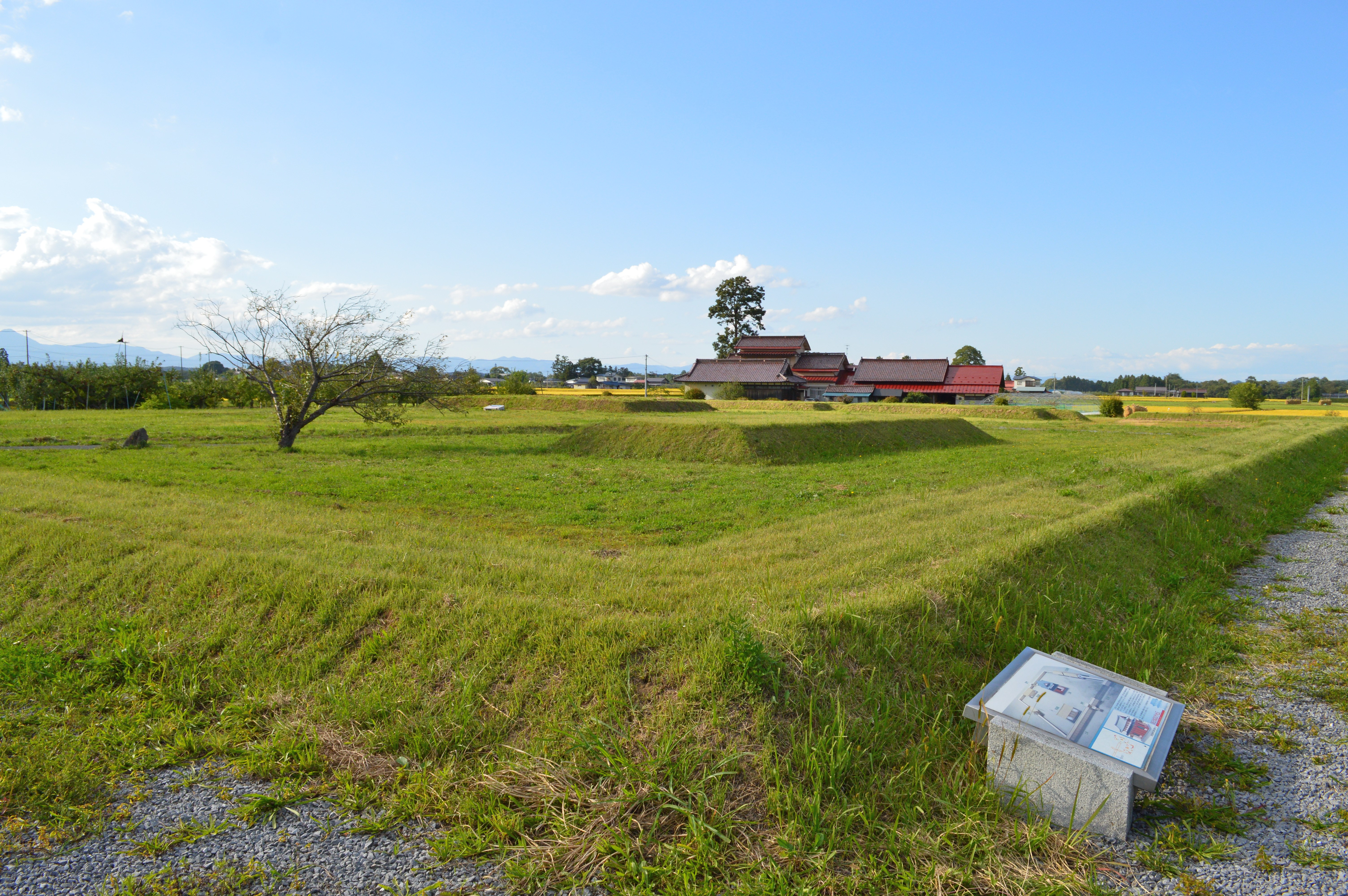 胆沢城跡 全景 (回廊から正殿を望む)